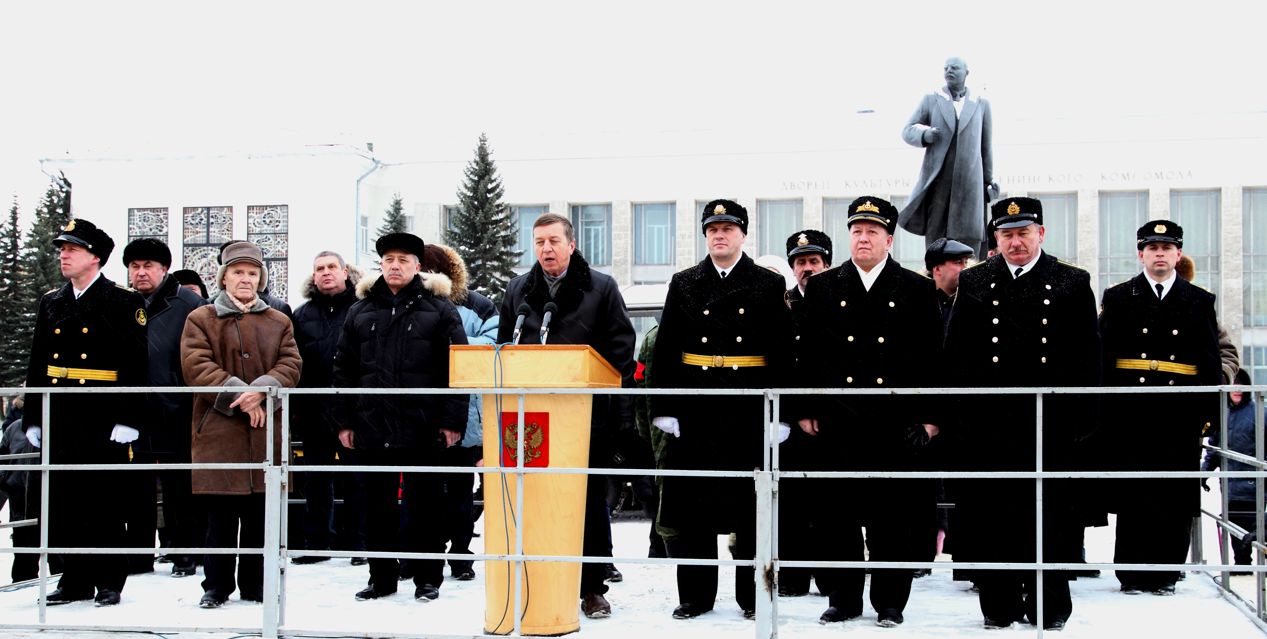 День защитника Отечества. 2012.